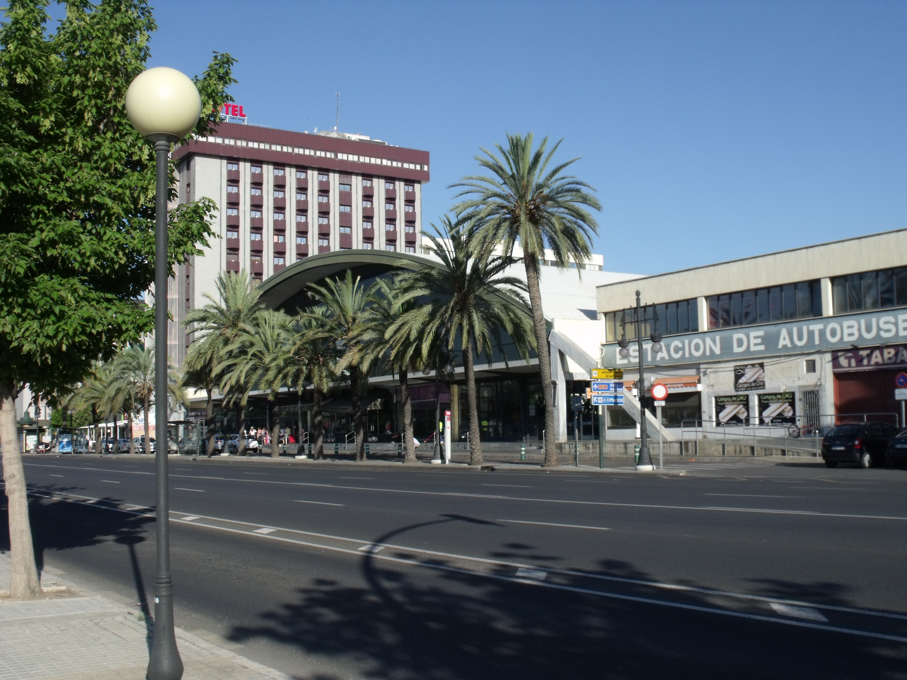 Estación de autobuses de Valencia.